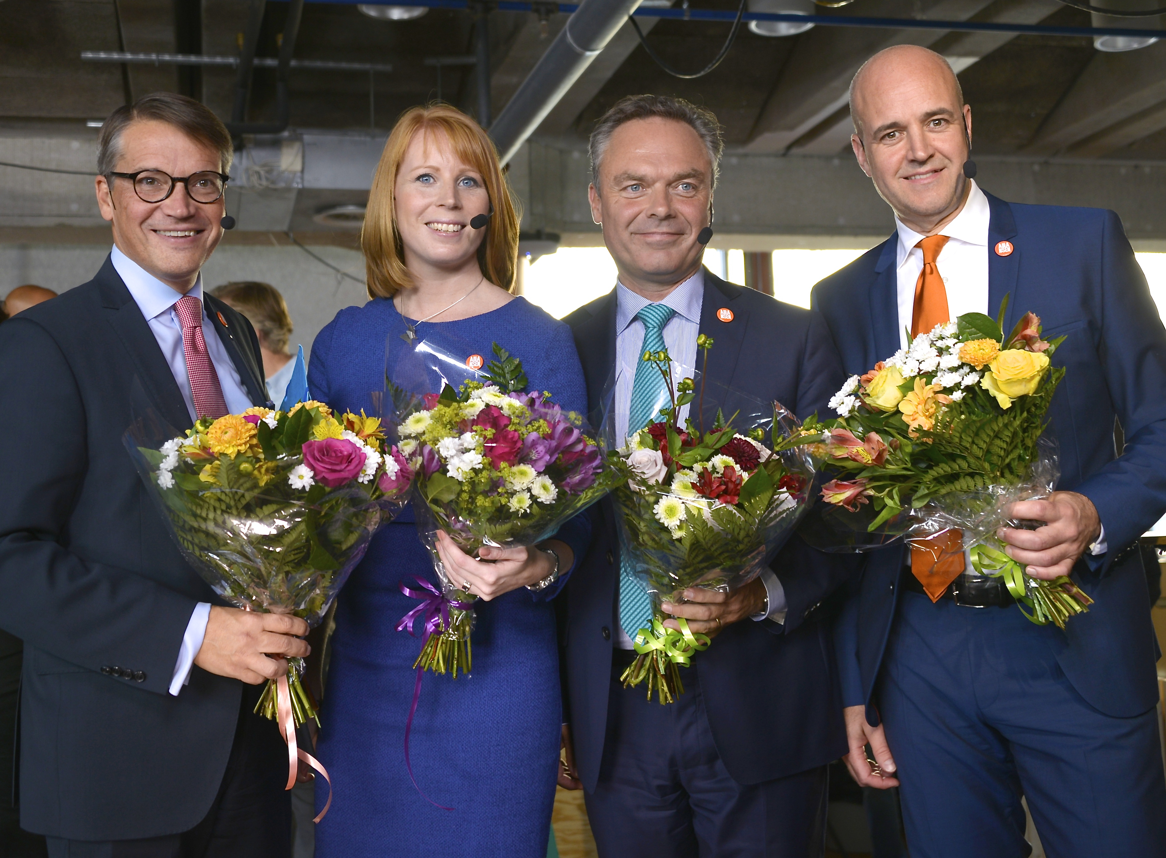 Alliansen inför valet i slutdebatten i Studio Ett i P1 den 10 september 2014.